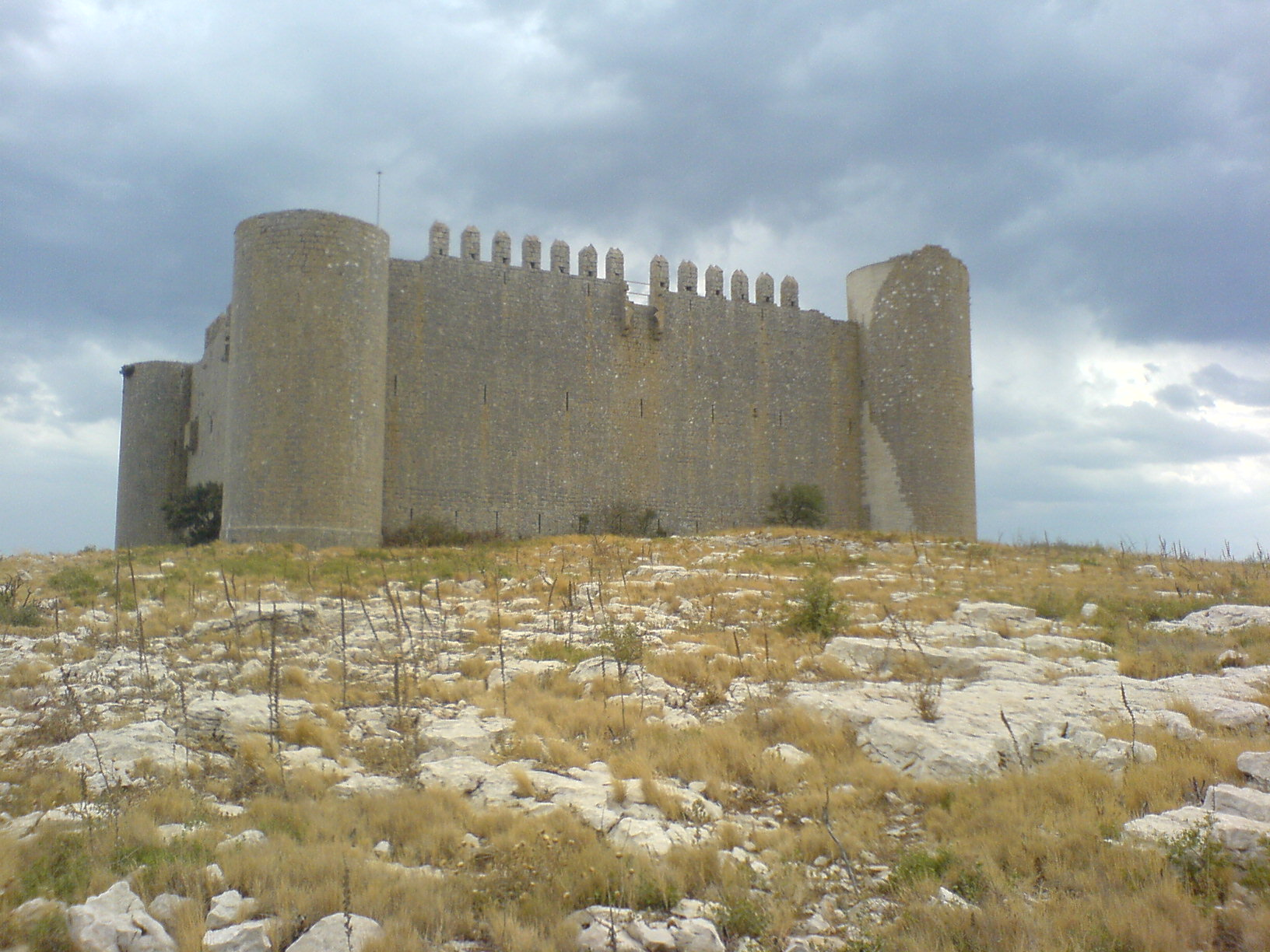 Foto van Castell Montgrí